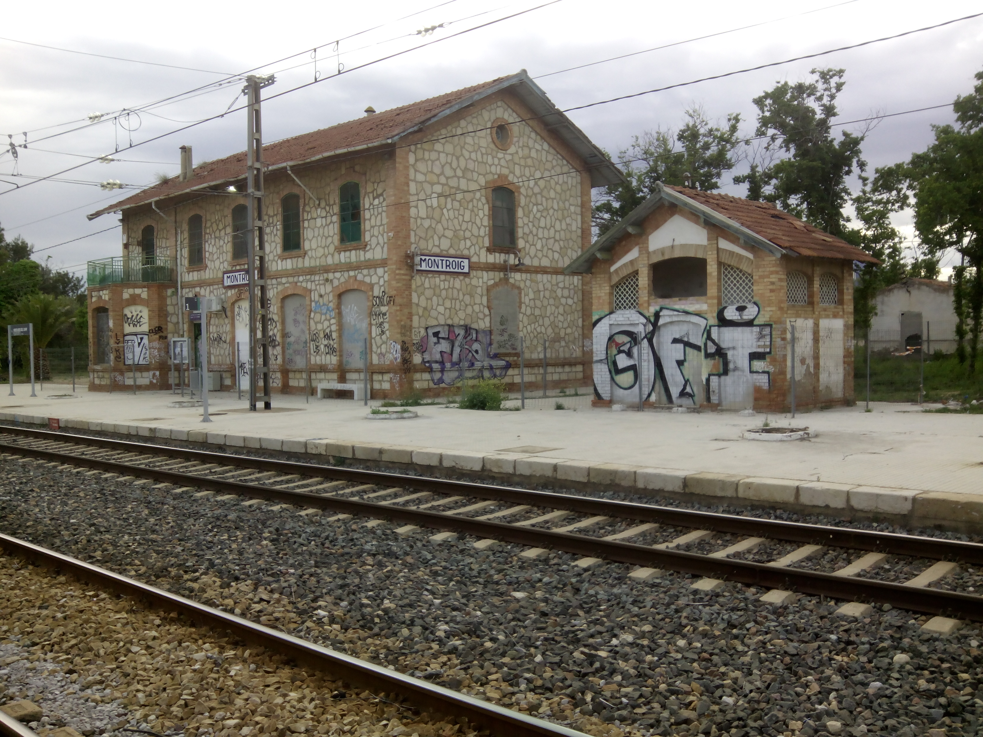 Edifici de viatgers i lavabos (tapiats)